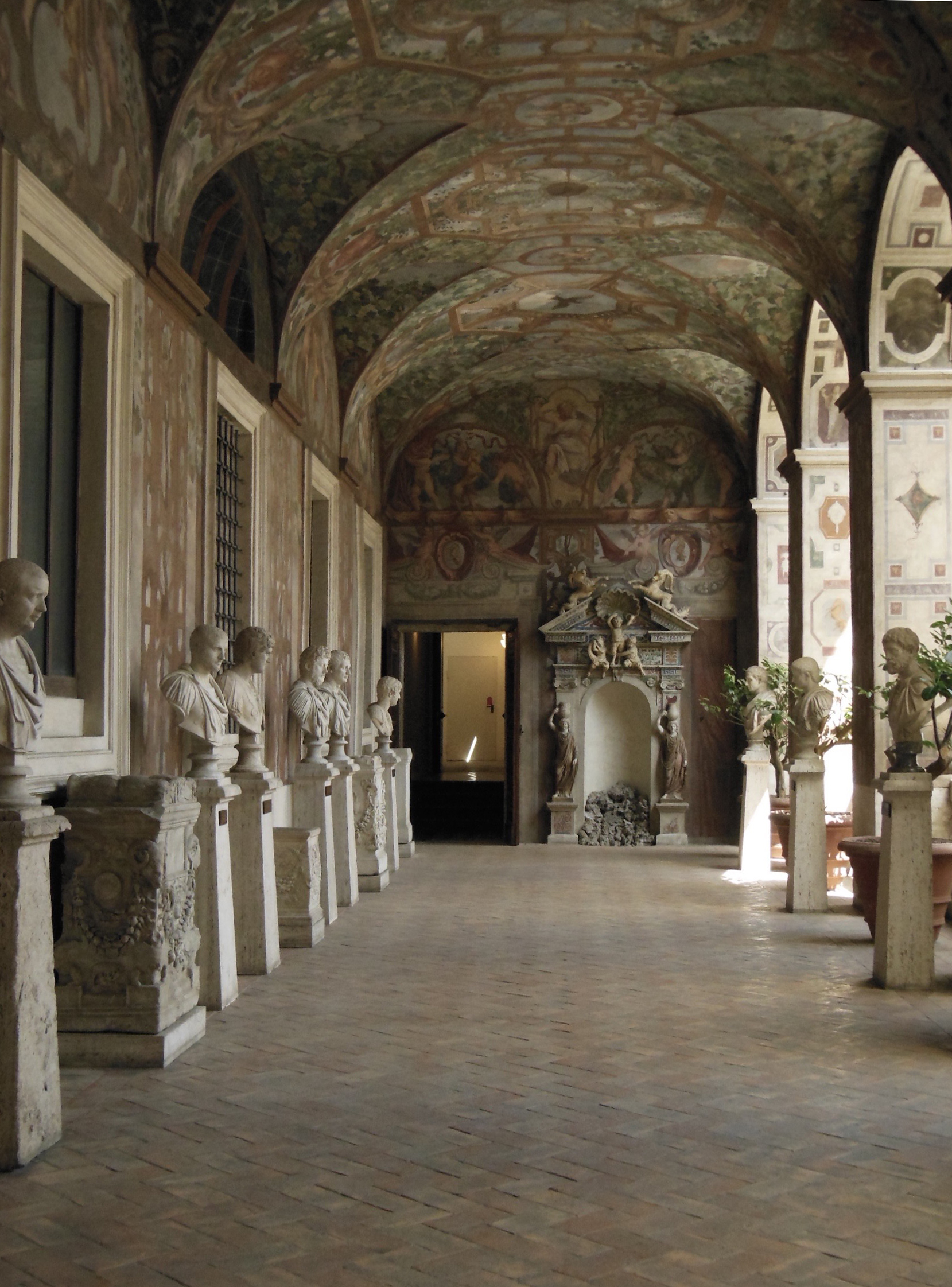 Roma, palazzo Altemps, loggia